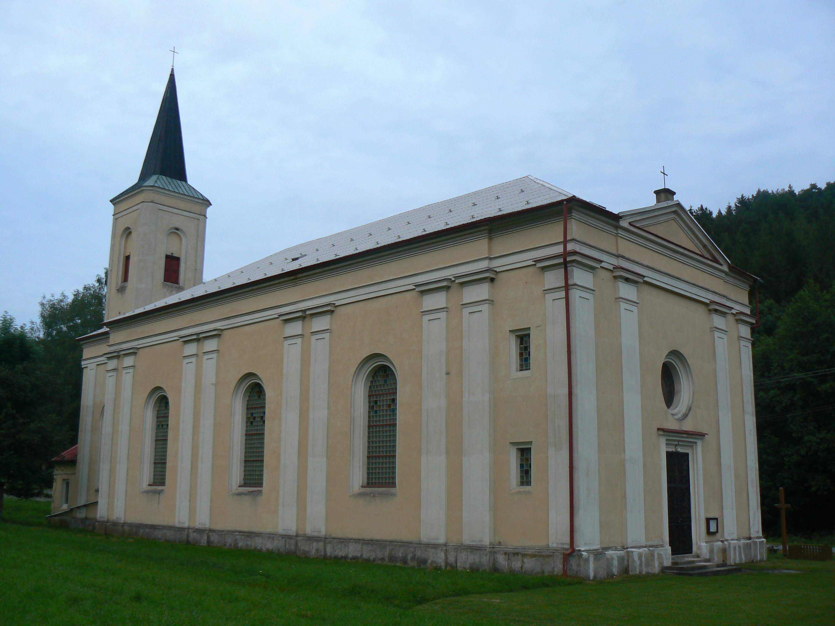 Kostel svatého Klimenta na Stupavě.